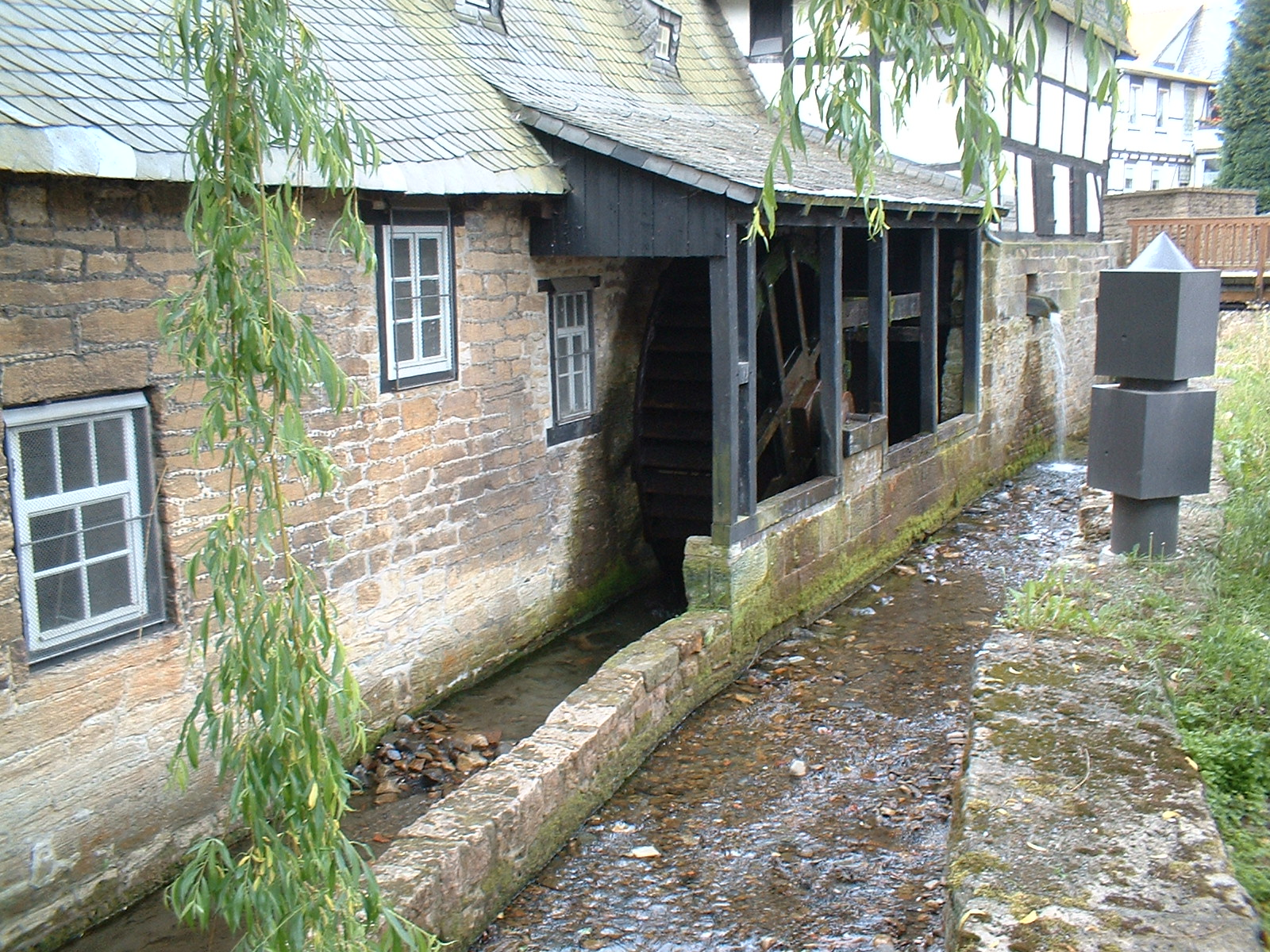 Lohmühle am Klapperhagen in Goslar